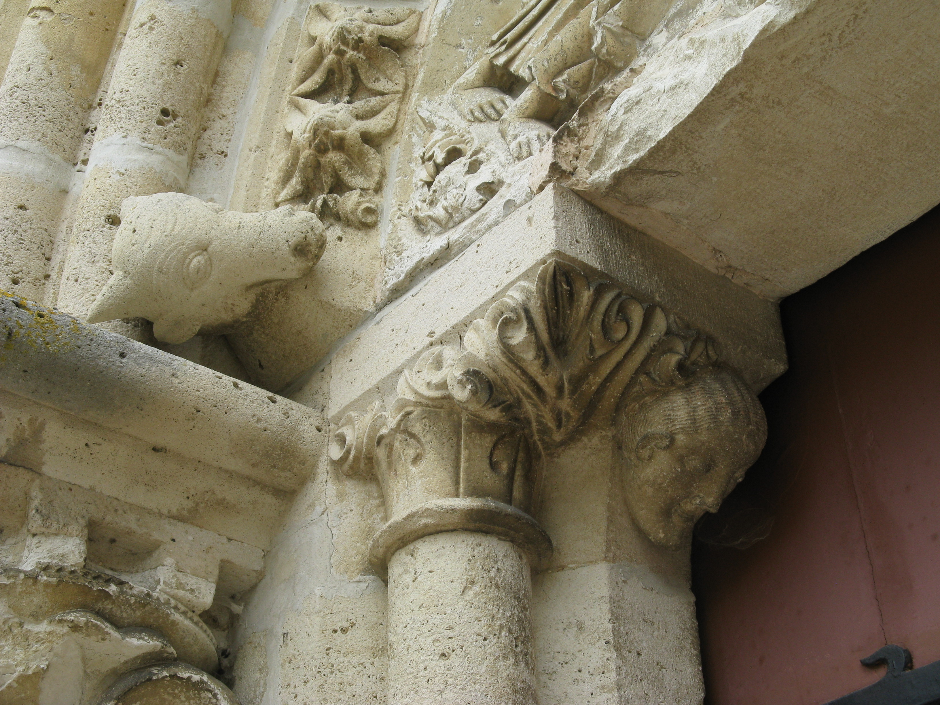 il s'agit d'un détail du portail de l'église de Cudot, Yonne, France